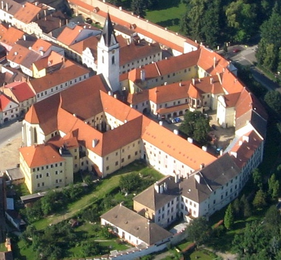 Klášter augustiniánů s kostelem sv. Jiljí a Panny Marie, Třeboň 125